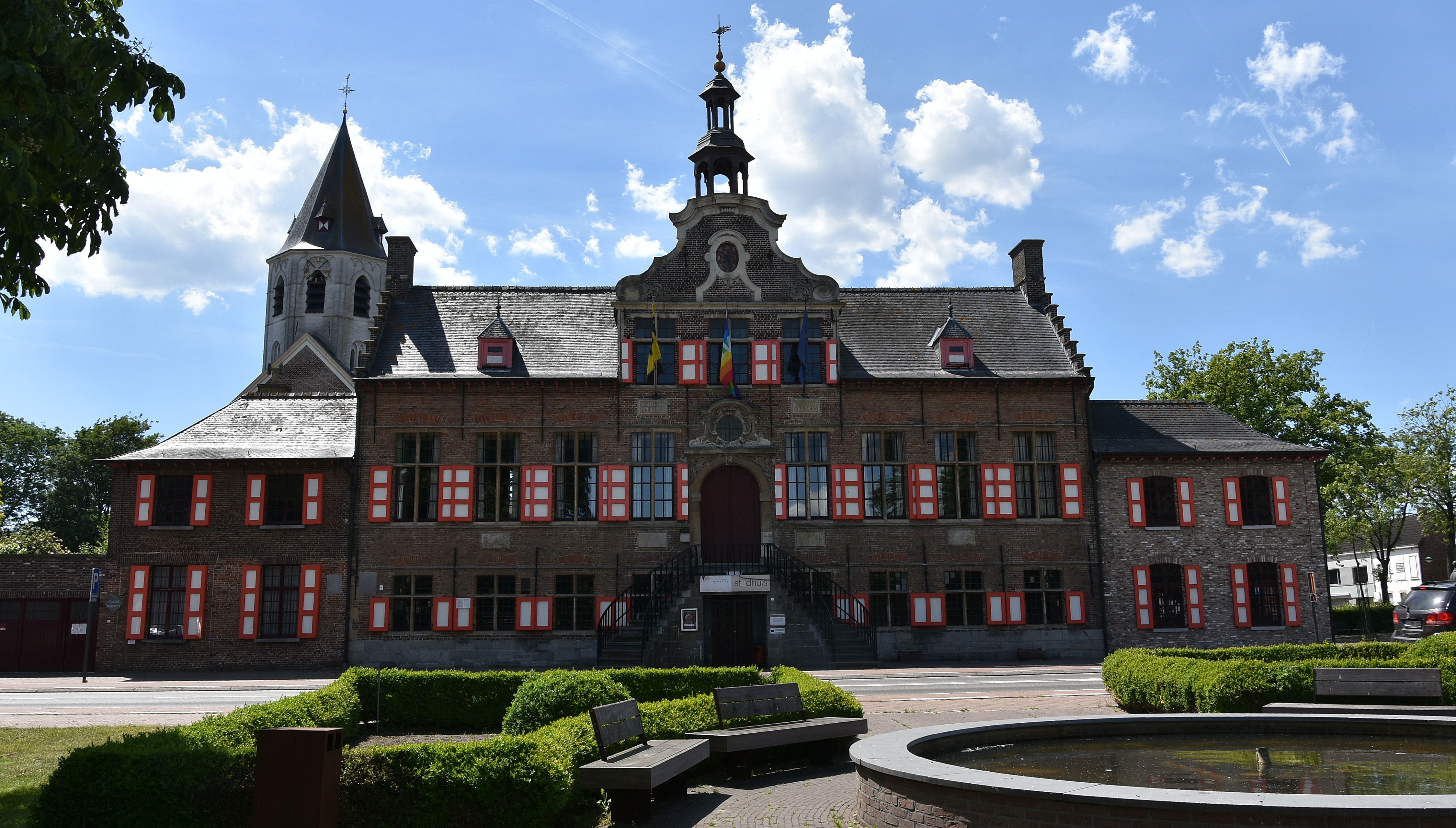 Kaprijke gemeentehuis (44708) 2-06-2019 15-16-14